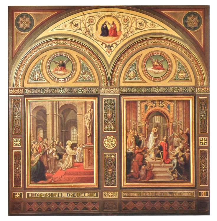 Ausmalung im Speyerer Dom, 2 Monumentalfresken von Johann Schraudolph umgeben von Dekorationsmalerei von Joseph Schwarzmann. Mutwillig zerstört 1960.